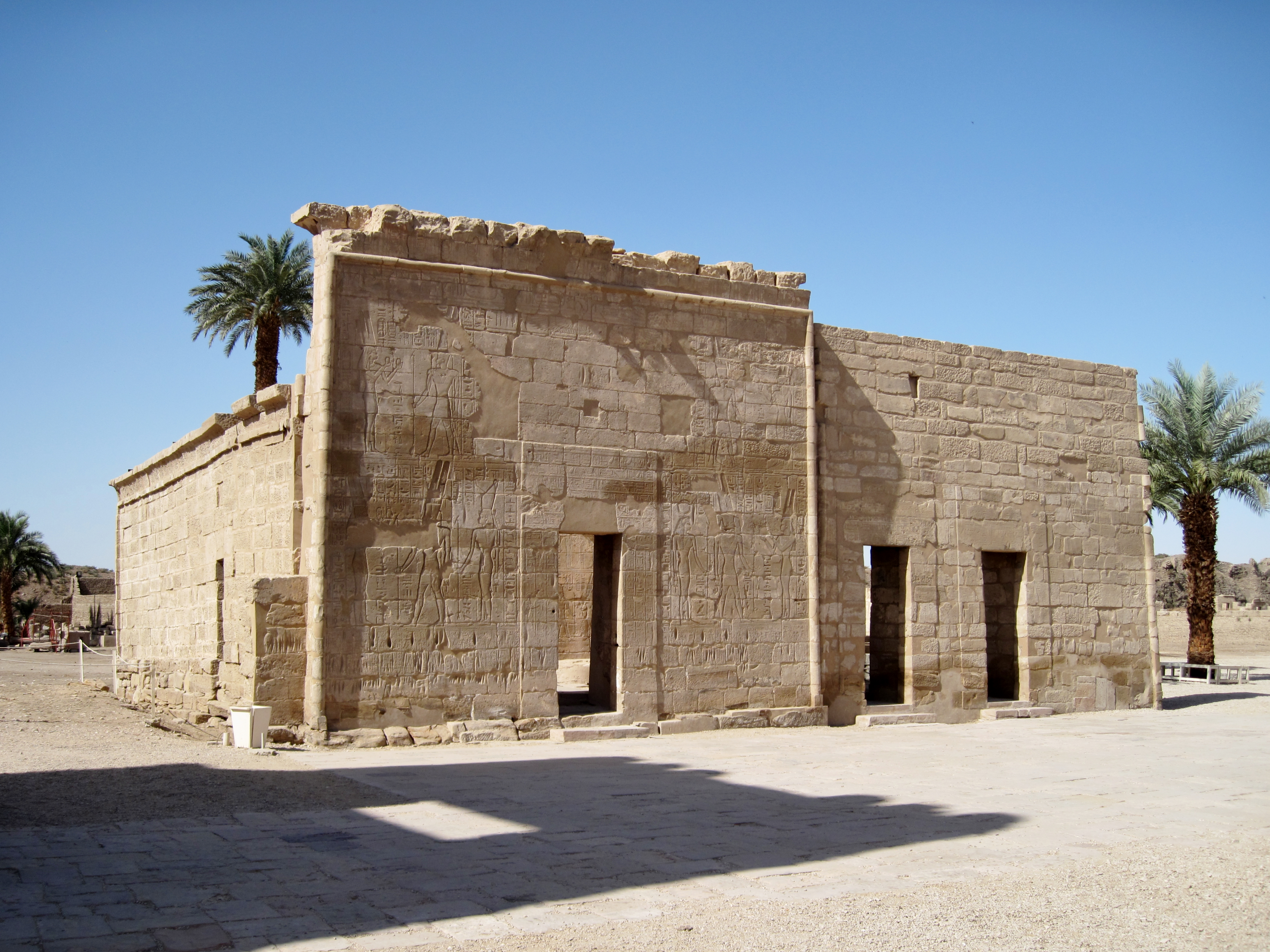 Grabkapellen der Gottesgemahlinnen des Amun, Amenirdis I., Schepenupet II. und Nitokris I. (Nebetneferumut), vor dem Tempel Ramses’ III. in Medinet Habu, Ägypten